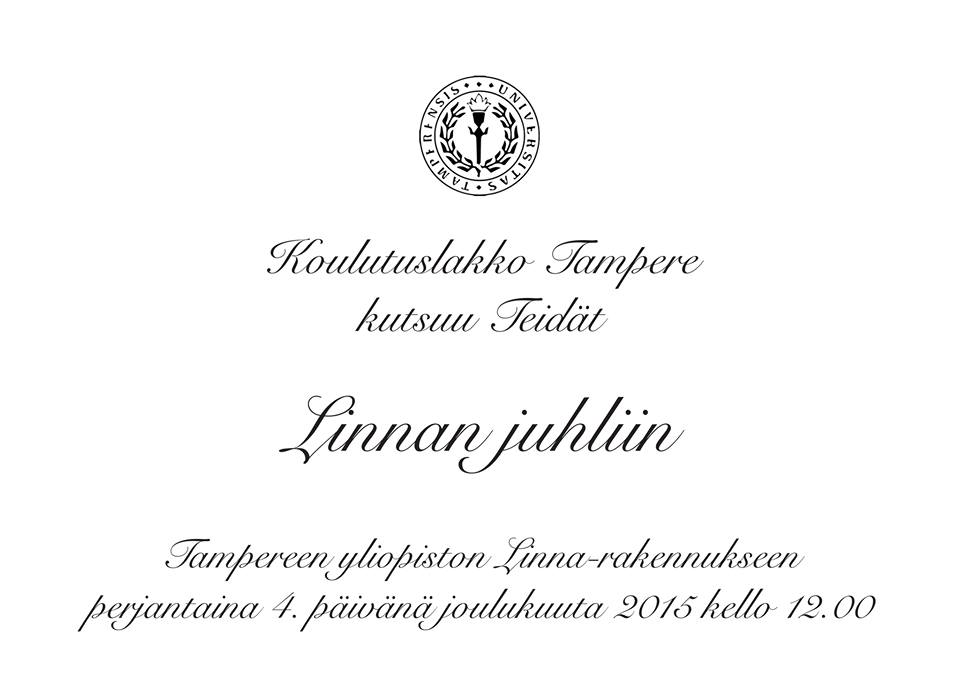 Kutsu Koulutuslakko Tampereen Linnan juhliin 2015